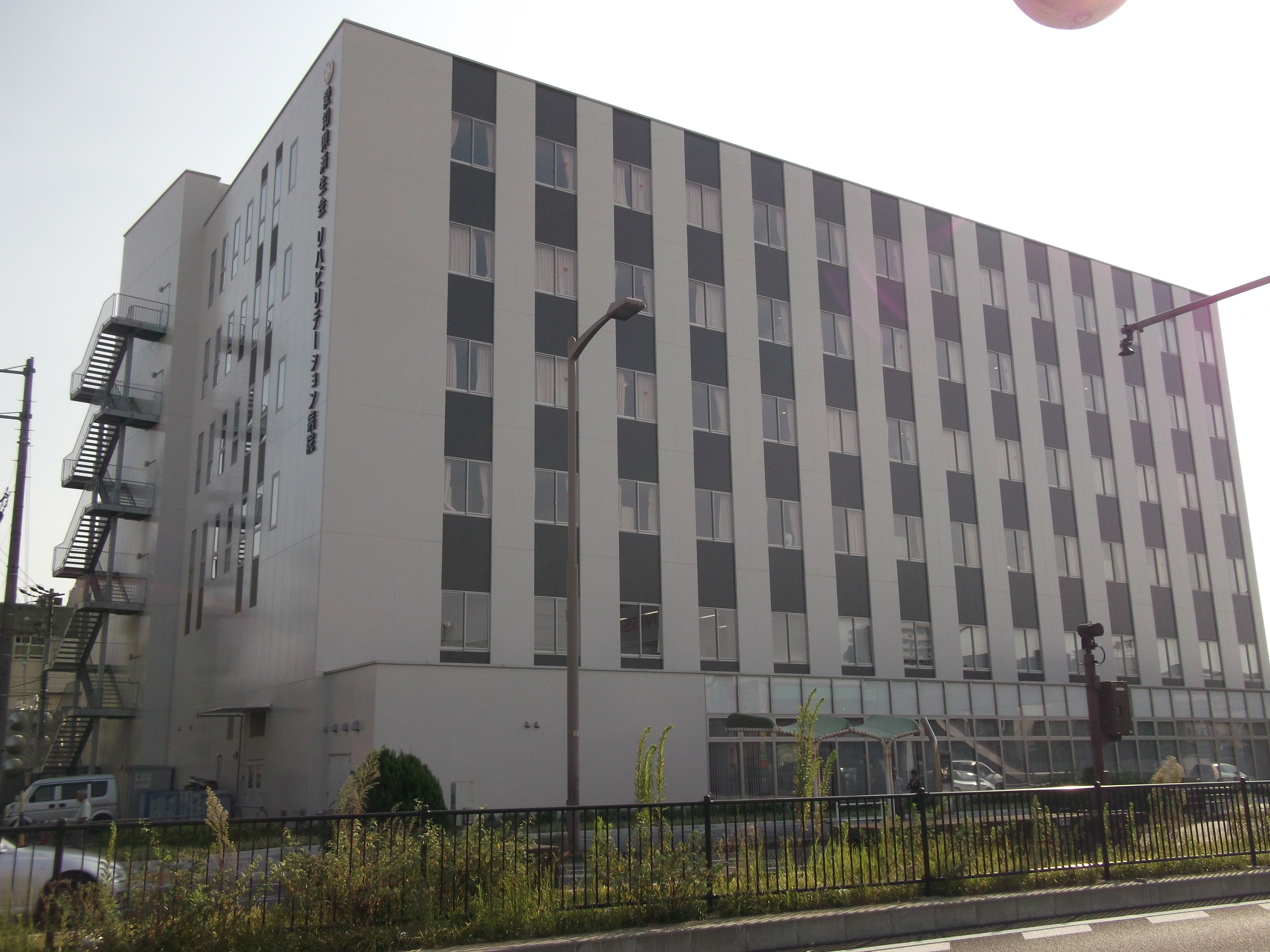 名古屋市西区にある愛知県済生会病院